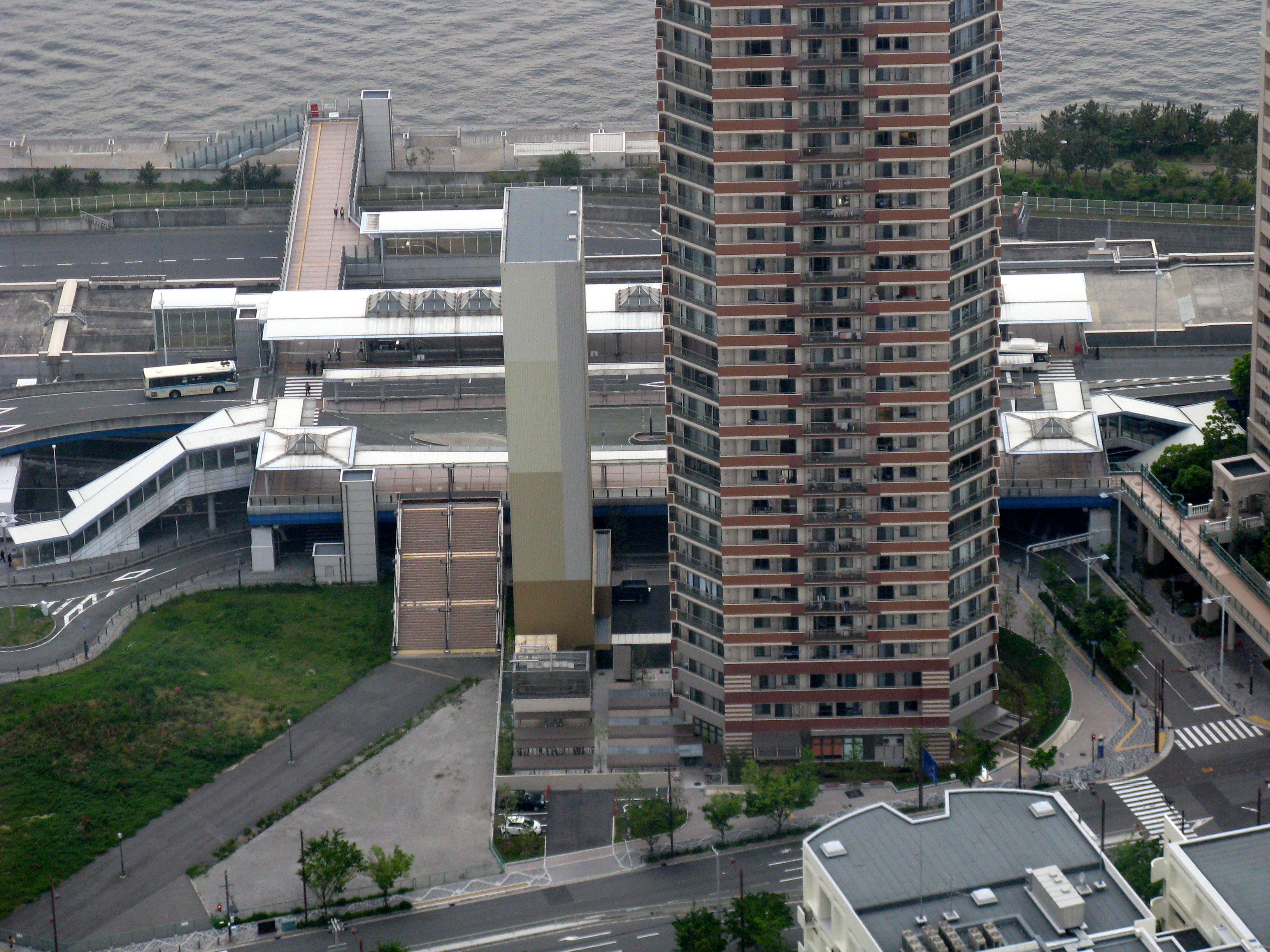 コスモスクエア駅